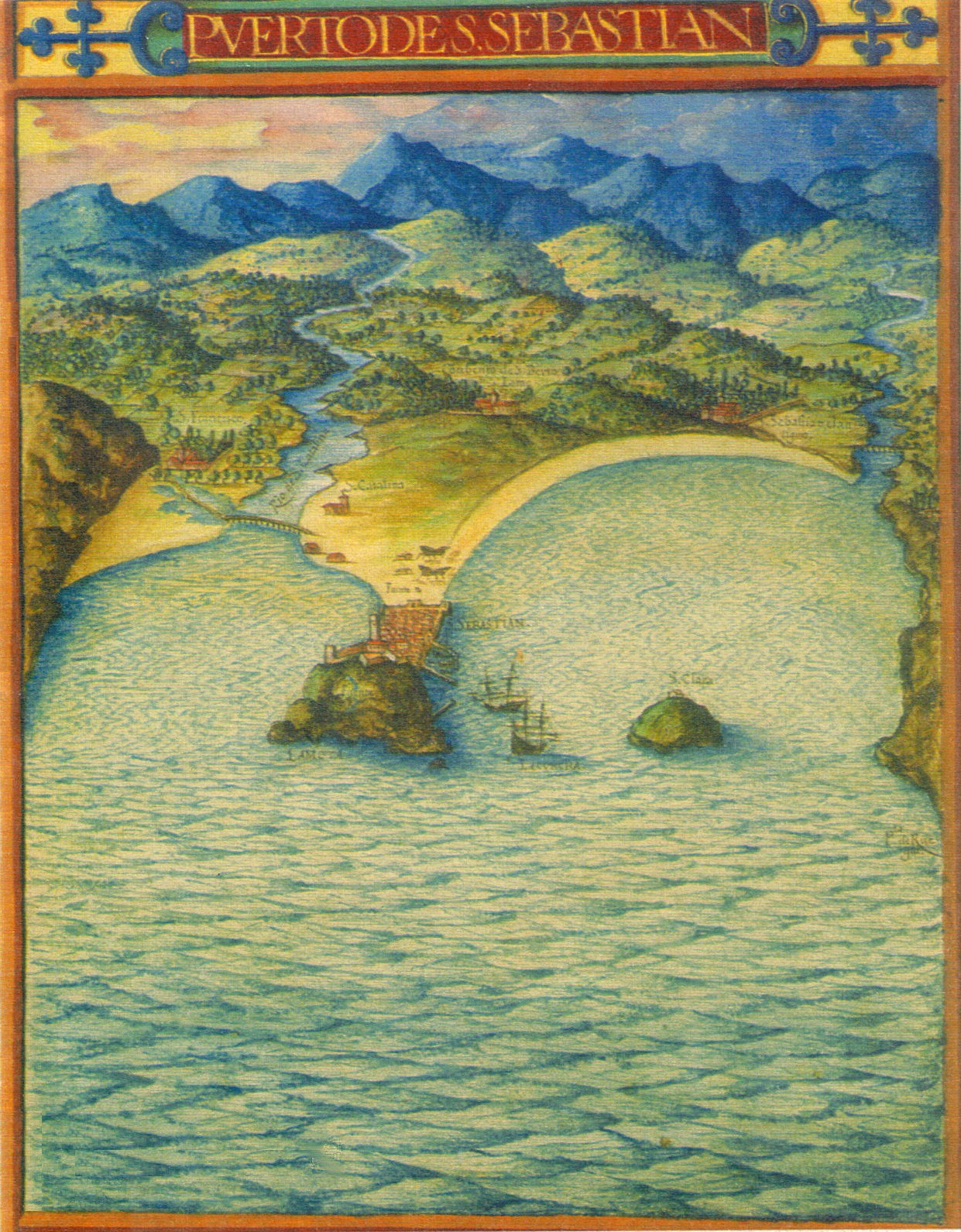 Cartografía de San Sebastián (España)